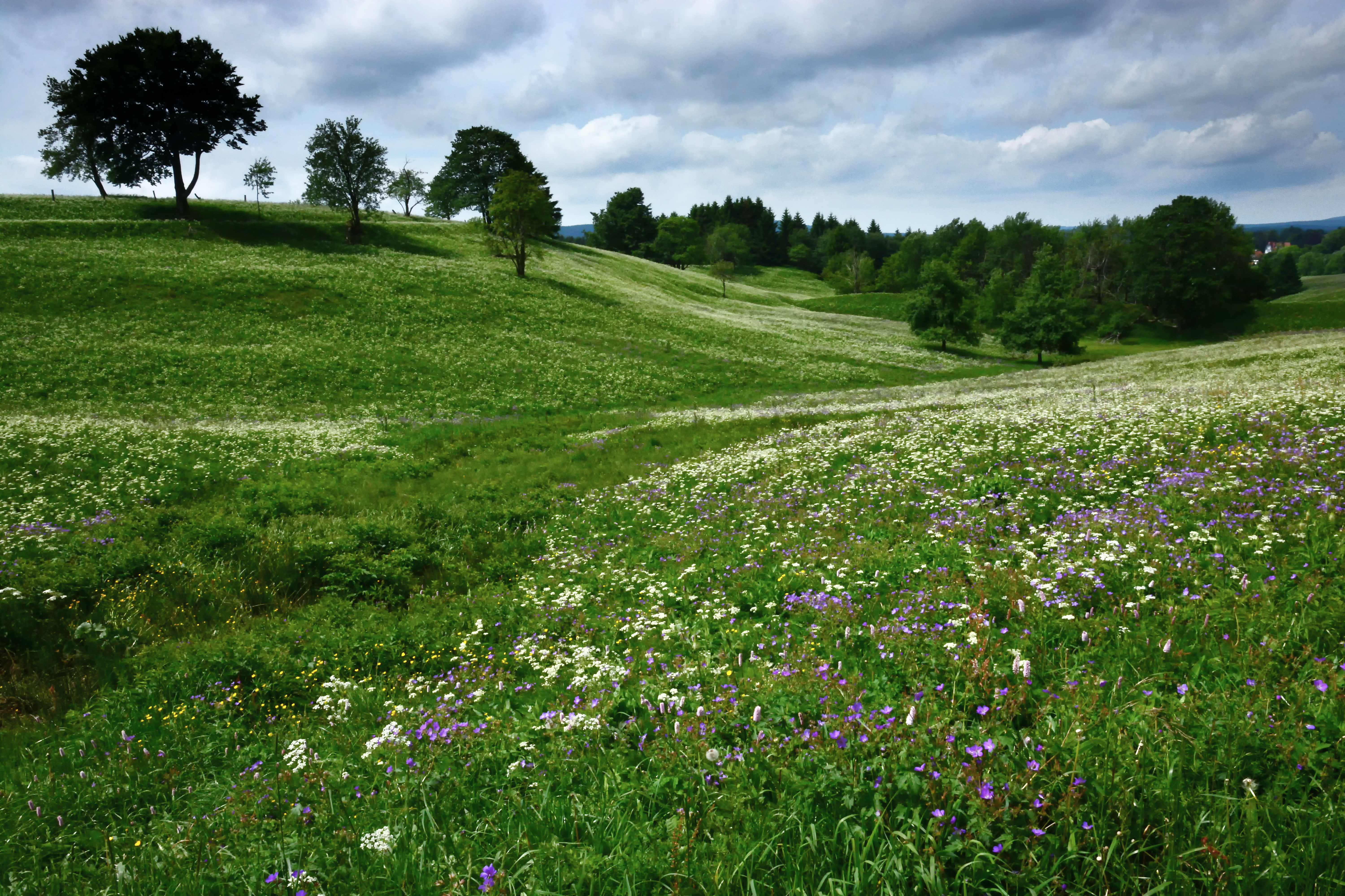 ungemähte Bergwiese bei St. Andreasberg im Oberharz, aufgenommen im Juni 2017